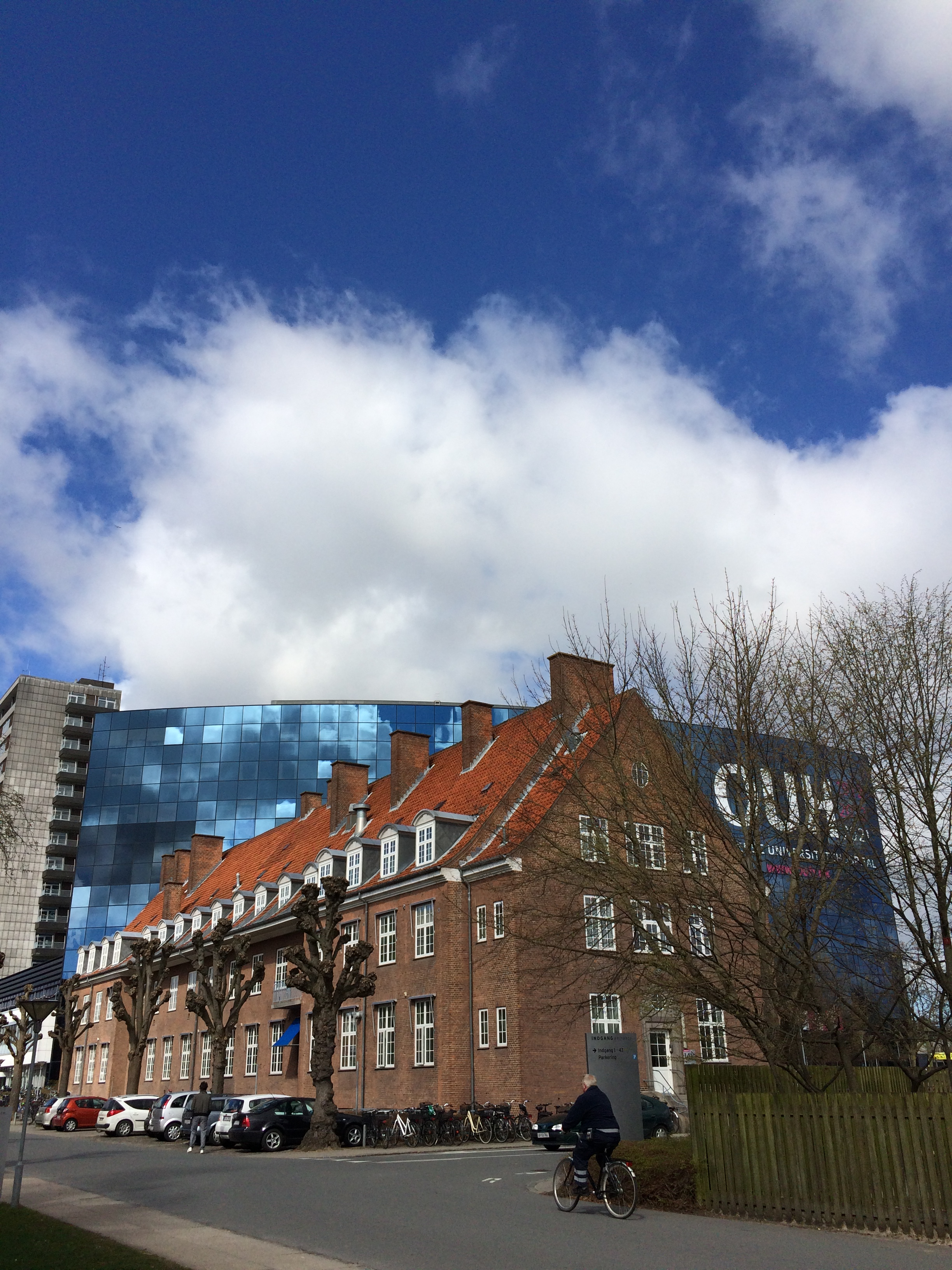 Odense Universitetshospital, april 2015